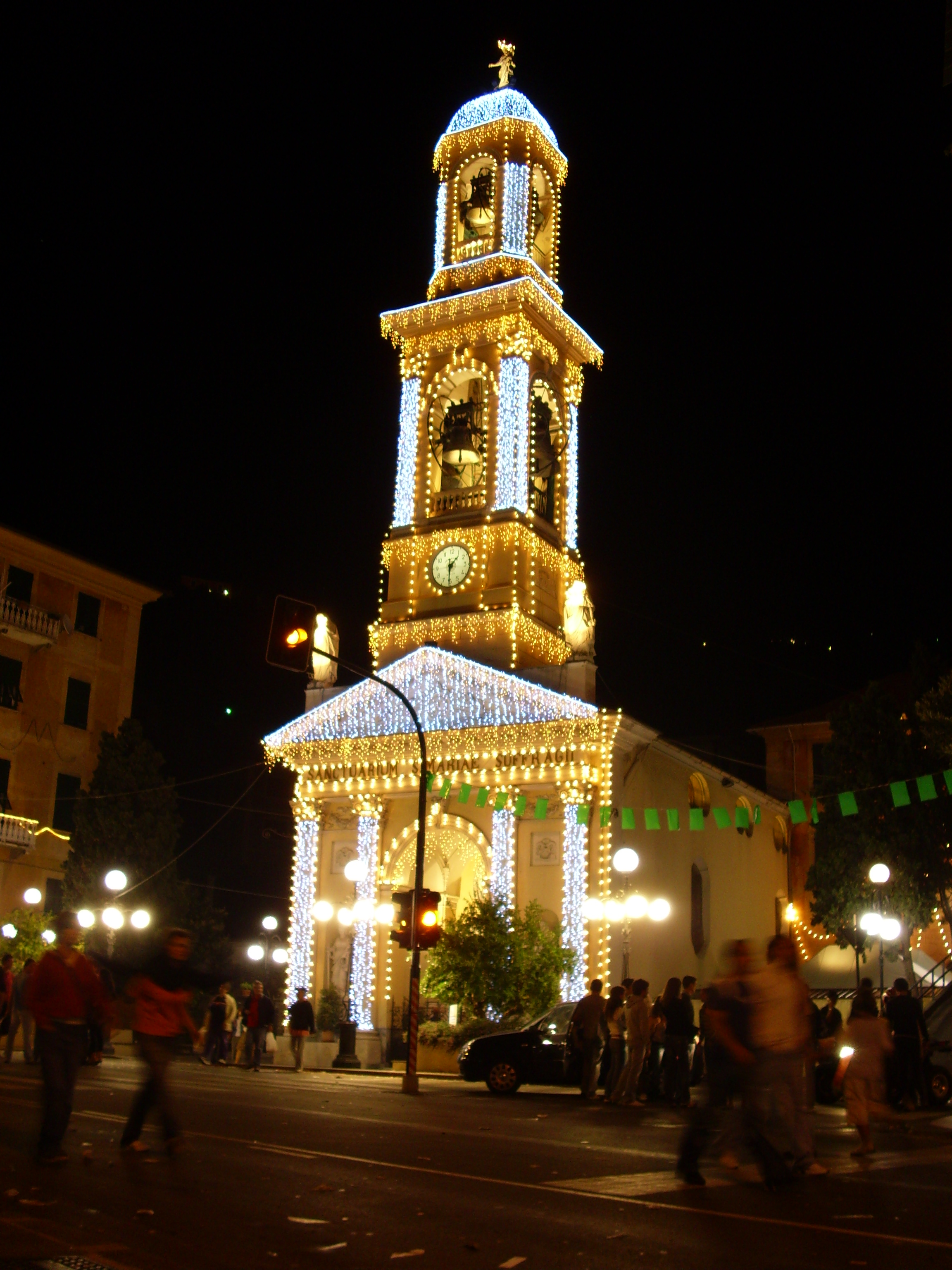 Santuario di Nostra Signora del Suffragio a Recco, con le luminarie per la festa del Fuoco